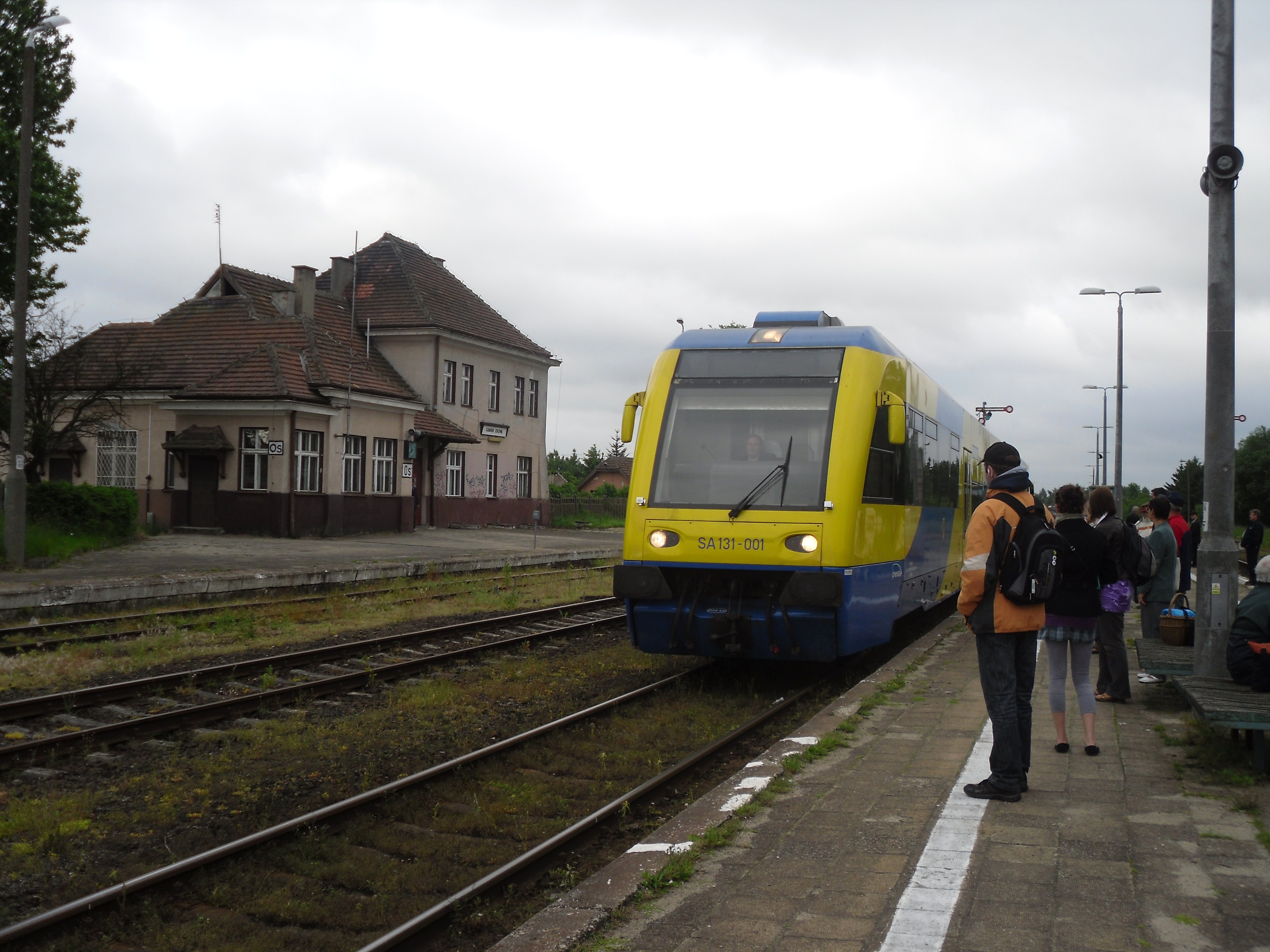 Pociąg SA131-001 Kościerzyna - Gdynia Główna na stacji Gdańsk Osowa.